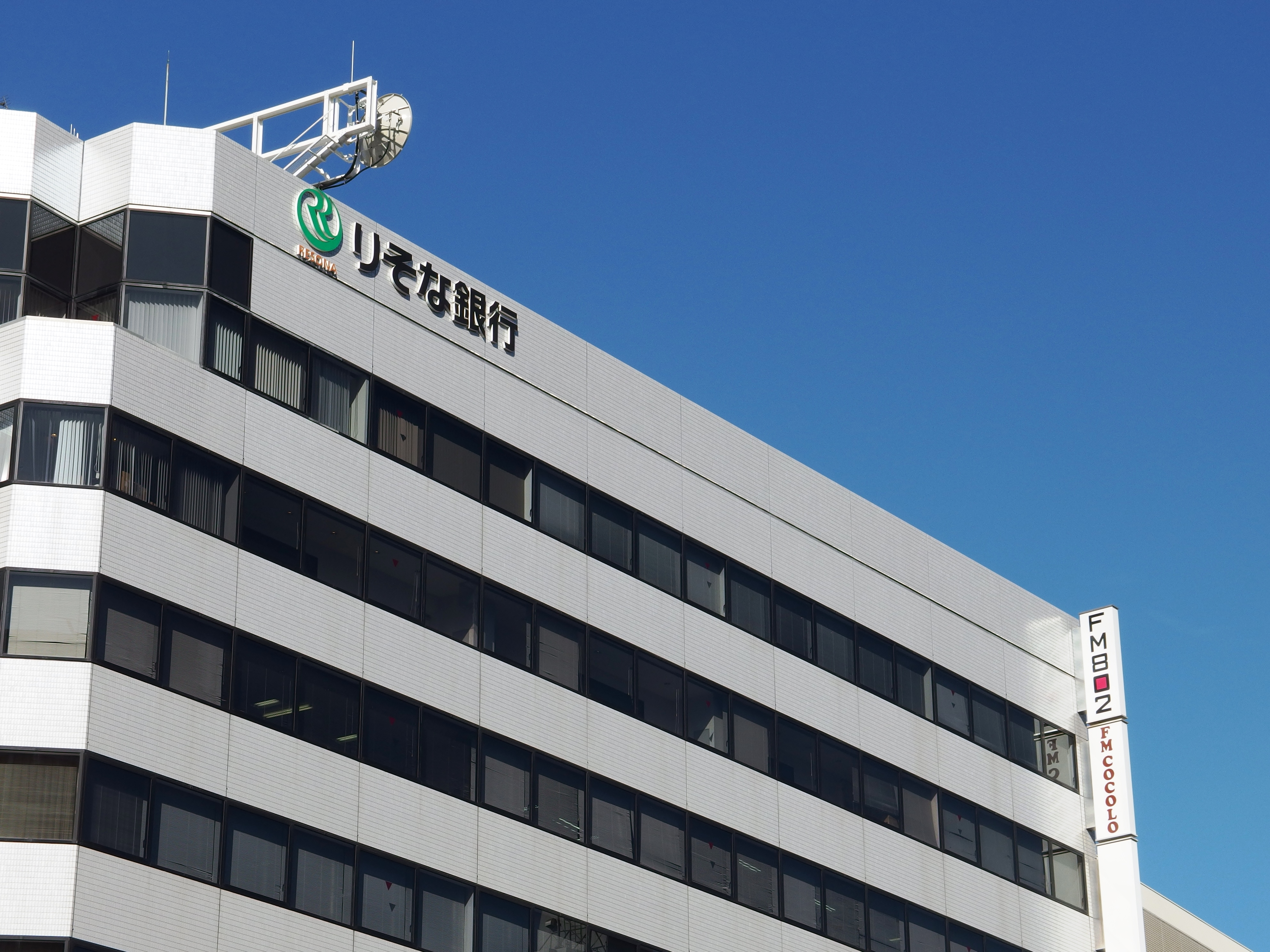 りそな銀行南森町支店を構える大和南森町ビル。上層階にはFM802とFM COCOLOが入る。屋上のパラボラアンテナは飯盛山送信所へ向けられている。